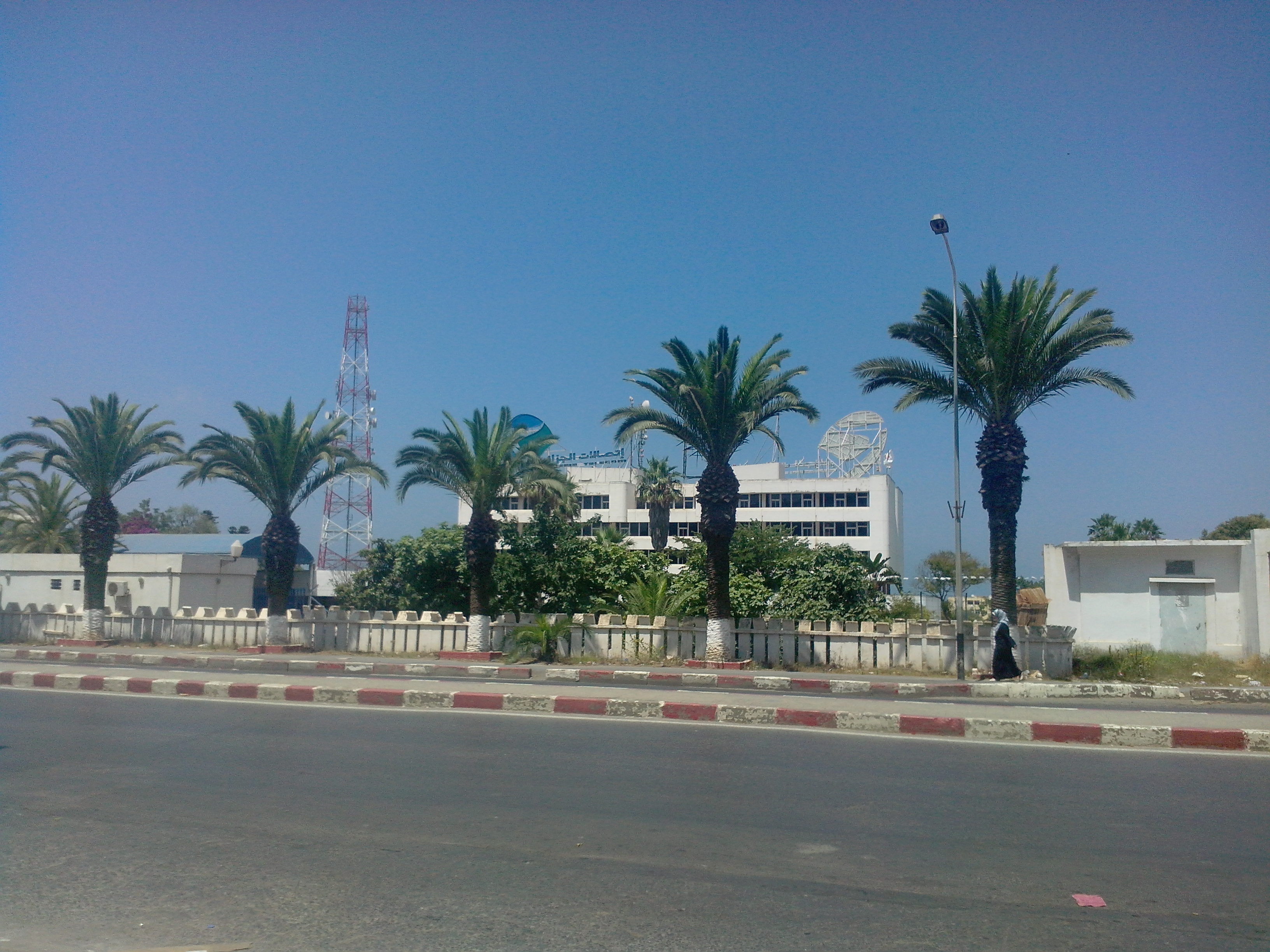 Façade arrière de la Direction générale d'Algérie Télécom, située à Mohammedia (Localisation exacte dans Google Maps). Cette photo a été prise depuis la RN5.